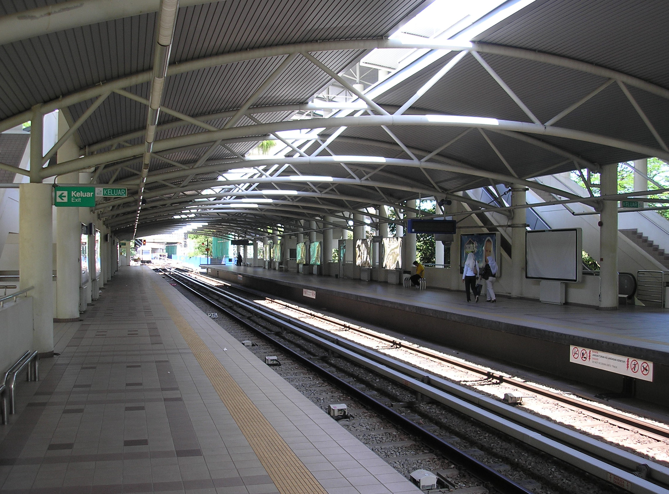 The Sri Petaling LRT station (Sri Petaling Line), Sri Petaling, Malaysia.